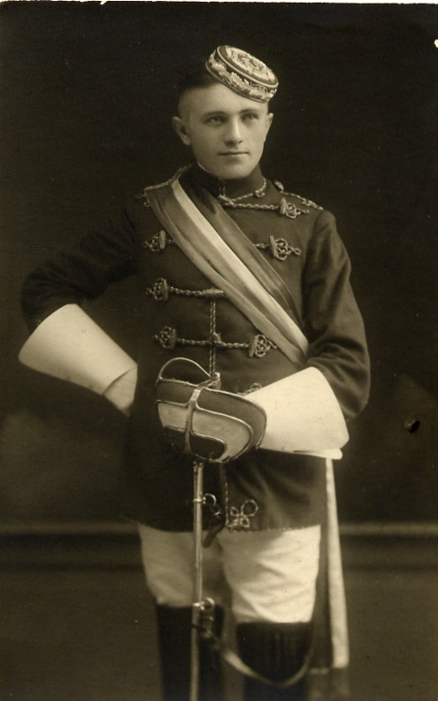 Pfarrer Theodor Nauerz, Grünstadt, als Student, 1929